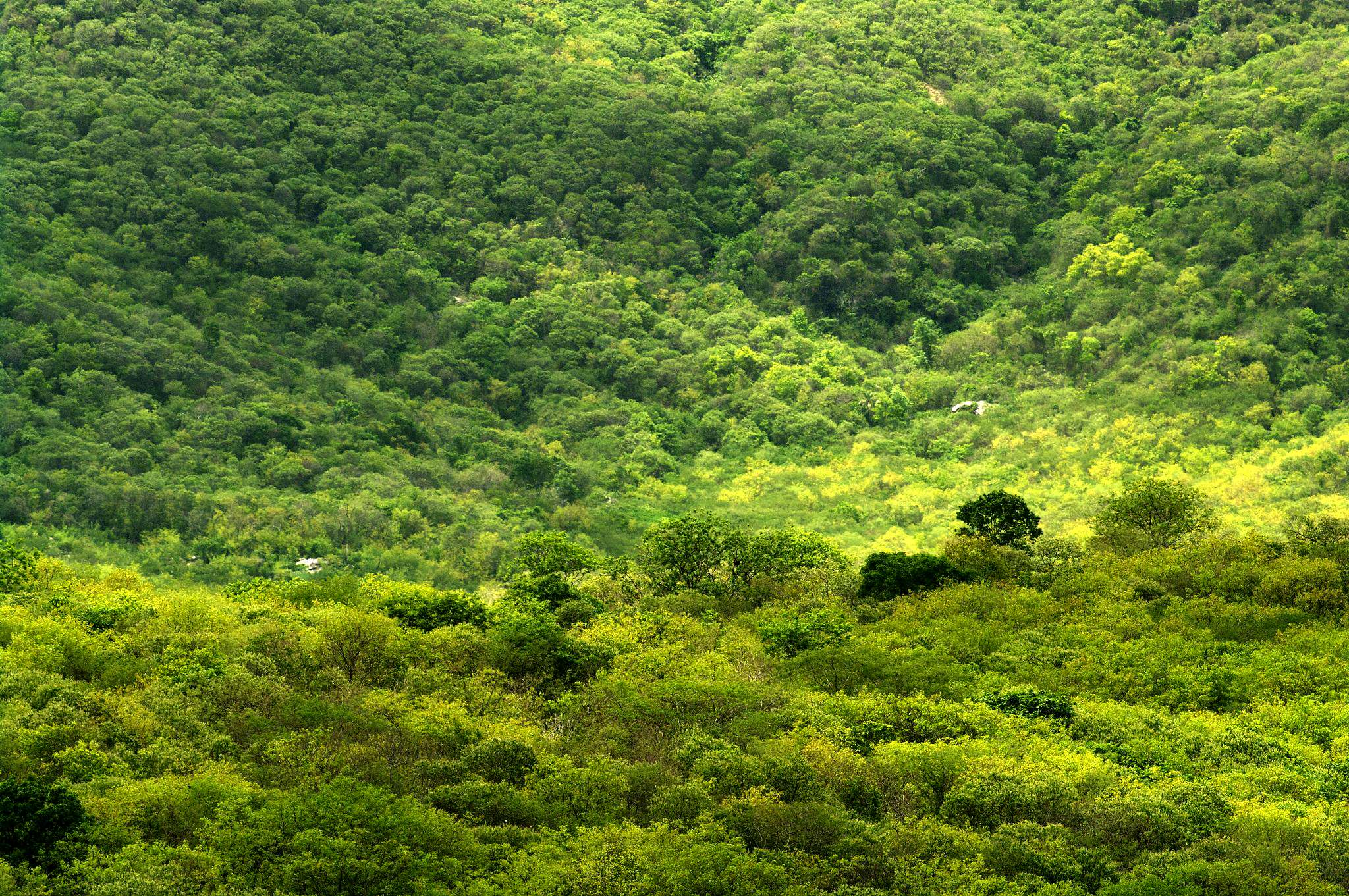 Chapada do Araripe